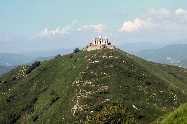 Foto propria Veduta Forte Diamante Marzo 2008 Licensing Categoria:Forti di Genova Categoria:Sant'Olcese